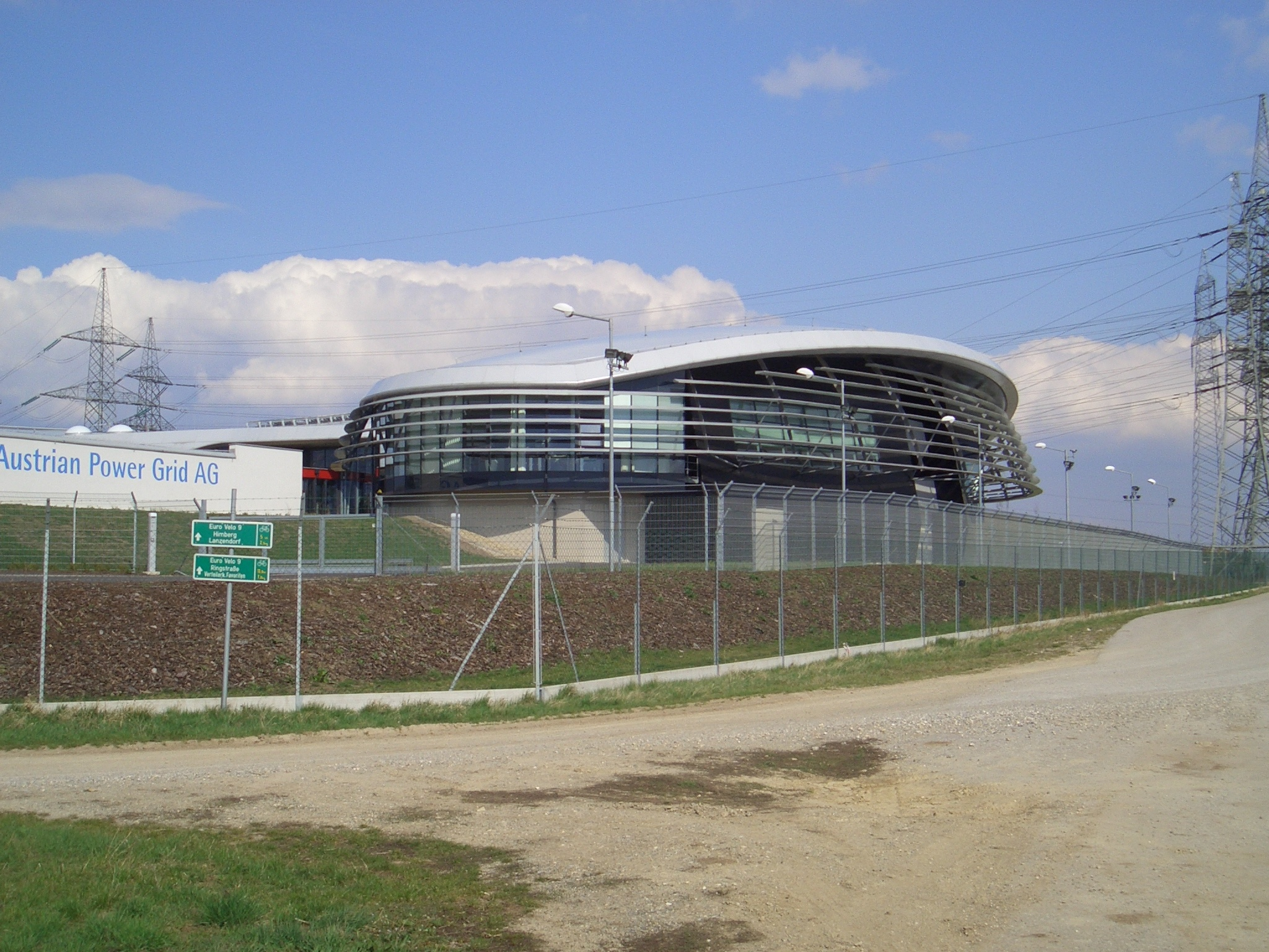 Umspannwerk Wien-Südost, APG-Steuerzentrale Power Grid Control (Hauptschaltleitung). Die Leitung im Hintergrund führt nach Sixtneusiedl, die zweite Leitung, die quer durch Bild führt ist die Leitung nach Györ. Die Leitung, die rechts neben der Halle beginnt ist eine 110 kV-Doppelleitung.